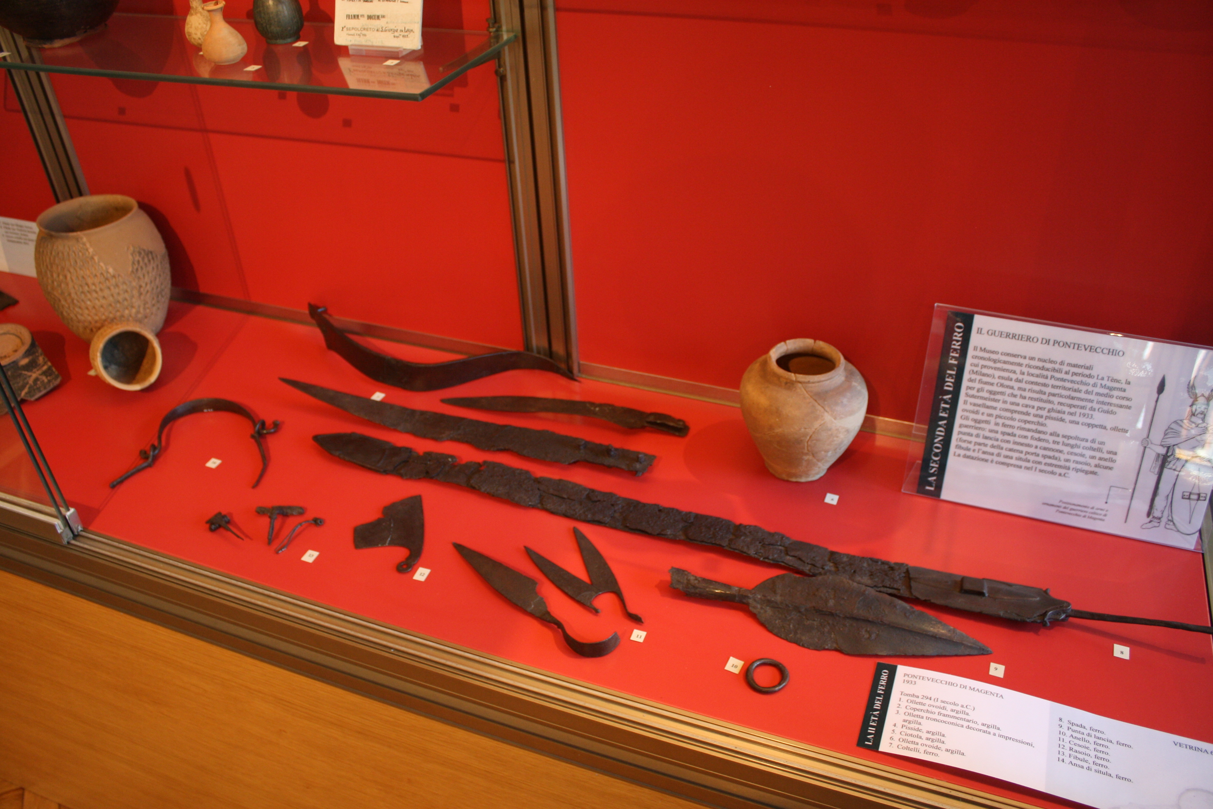 Il Guerriero di Pontevecchio (I secolo a.C.) rinvenuto a Pontevecchio di Magenta nel 1933